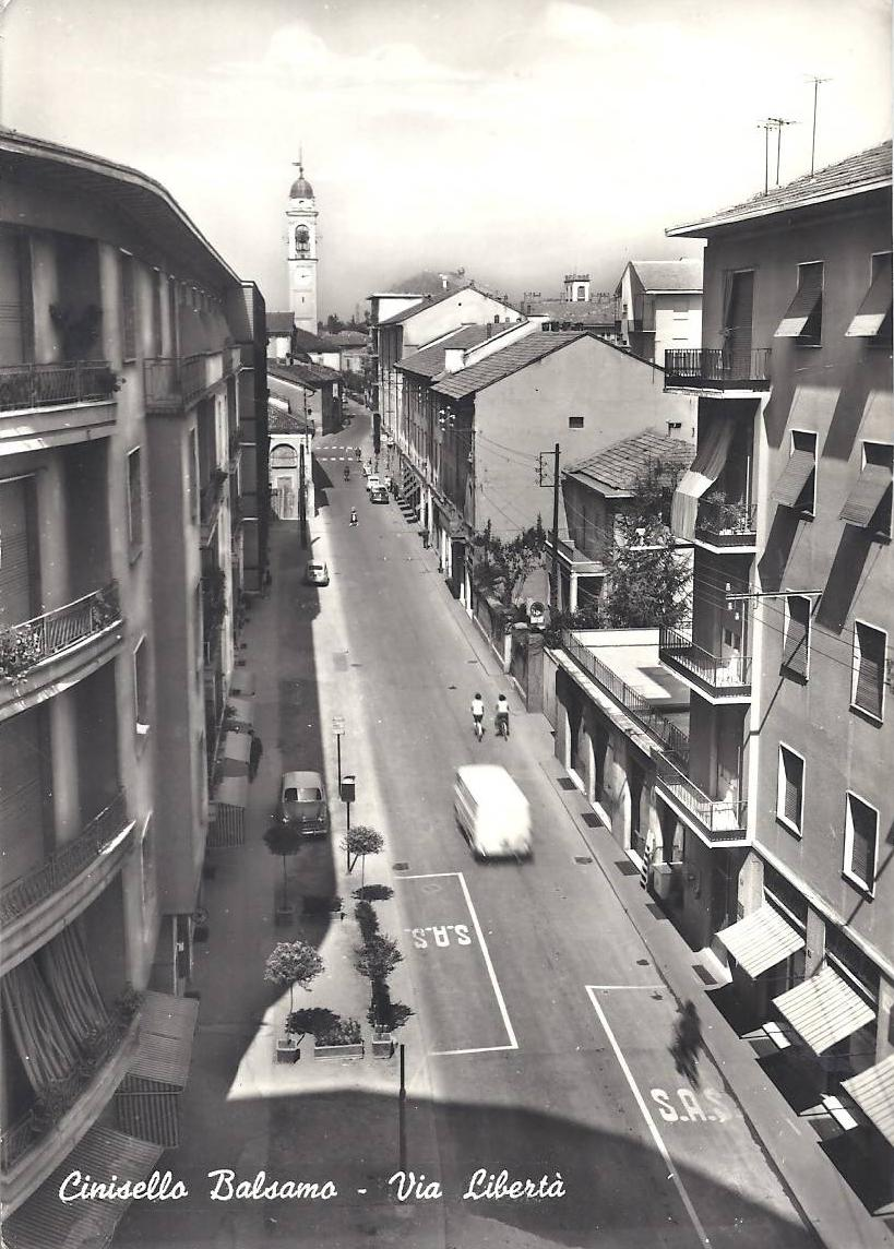 Cinisello Balsamo, via Libertà negli anni Cinquanta. Si notino le fermate della SAS (Società Autolinee Sestesi).